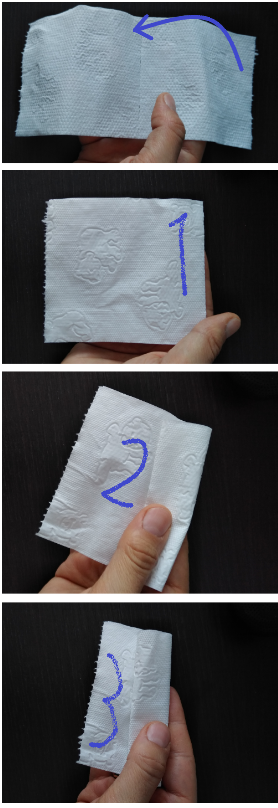 Metodo per risparmiare risorse: uso responsabile della carta igienica che in tempi di coronavirus è venuta a mancare in molti centri